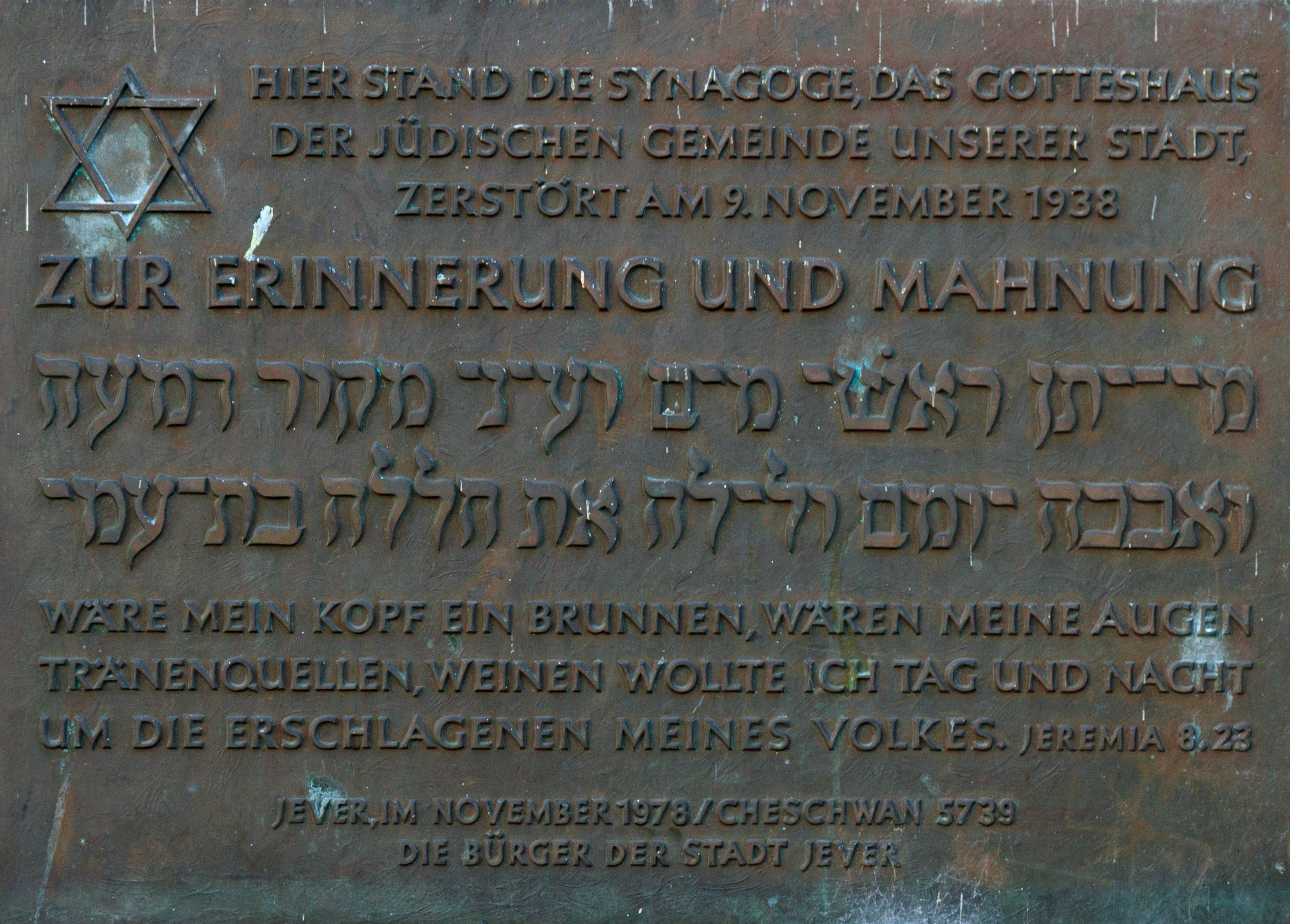 GröschlerHaus - Zentrum für Jüdische Geschichte und Zeitgeschichte der Region auf den Grundmauer der von örtlichen Nationalsozialisten zerstörten Synagoge von Jever